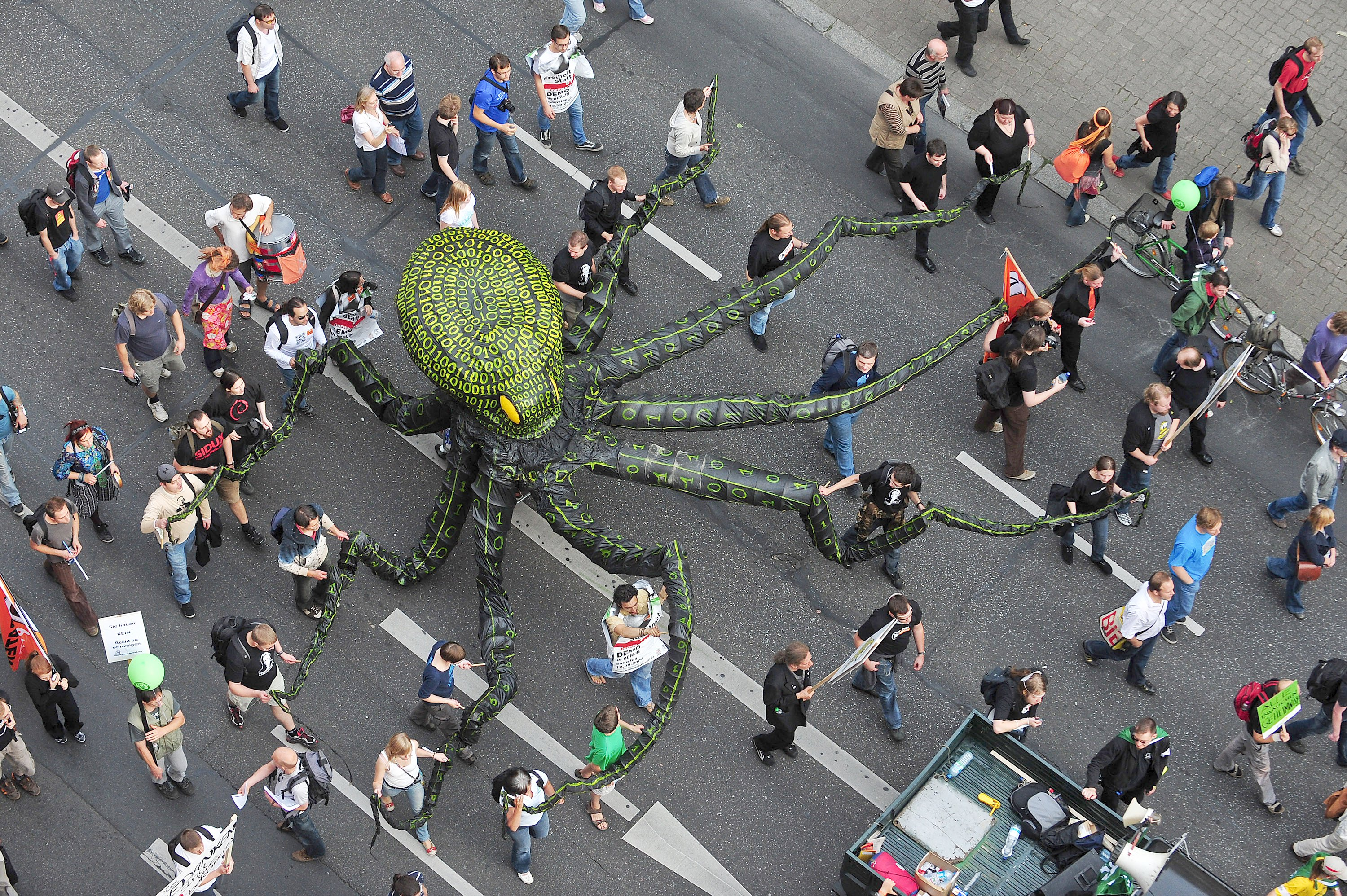 Plastische Darstellung eines Datenkraken (Spannweite ca. 18 Meter) auf der Demonstration "Freiheit statt Angst" 2009. Gebaut und koordiniert von dem Künstler Peter Ehrentraut für den FoeBuD e. V. (seit 2012: Digitalcourage e. V.